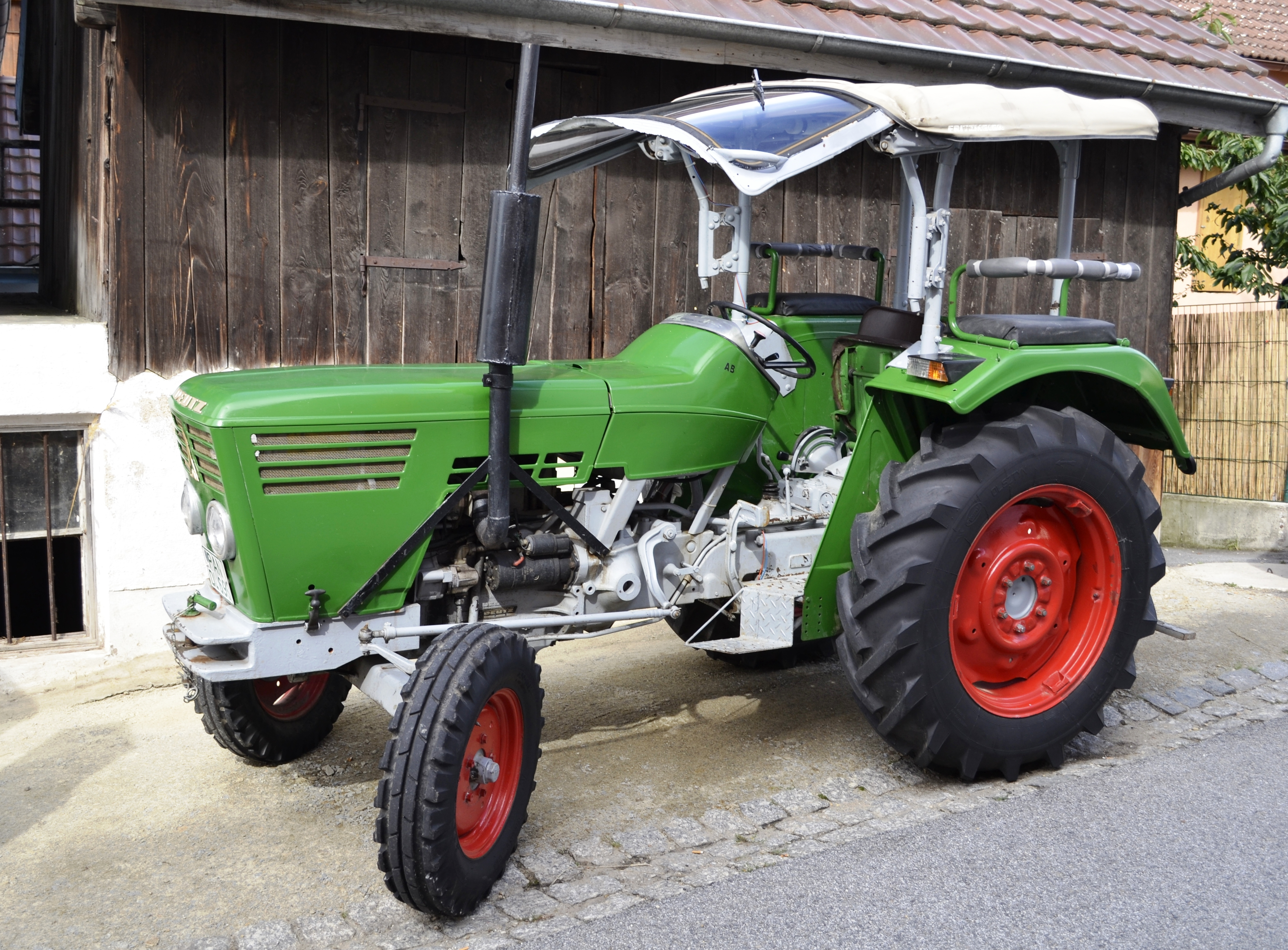 Ein Deutz-Traktor der D-06-Reihe in Bayern.